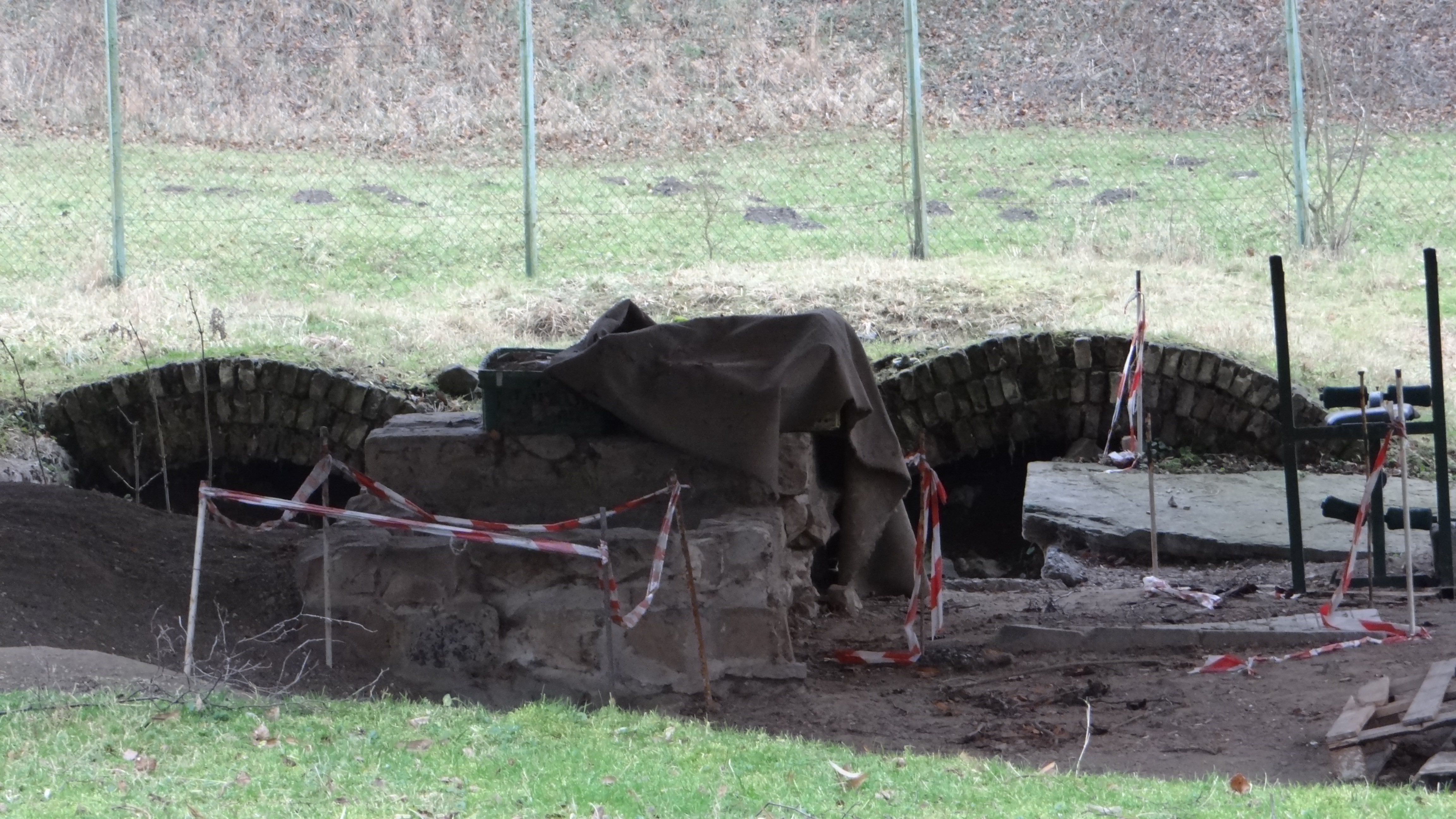 Maing - Parc archéologique de l'abbaye de Fontelle